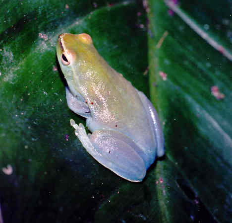 Sphaenorhynchus lacteus